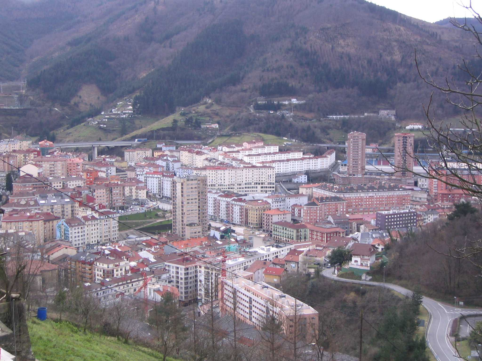 Eibar, vista parcial. Vista de parcial de Eibar, Guipúzcoa, País Vaco, España.